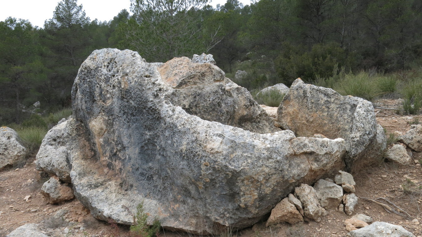 Bassa de la Solana de las Pilillas (època ibera, segle V abans de Crist), excavada en la roca per a l'elaboració de vi i oli, situada en Los Duques, pedania del municipi valencià de Requena.